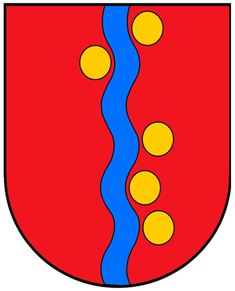 Stemma del Comune di Blenio (Svizzera)